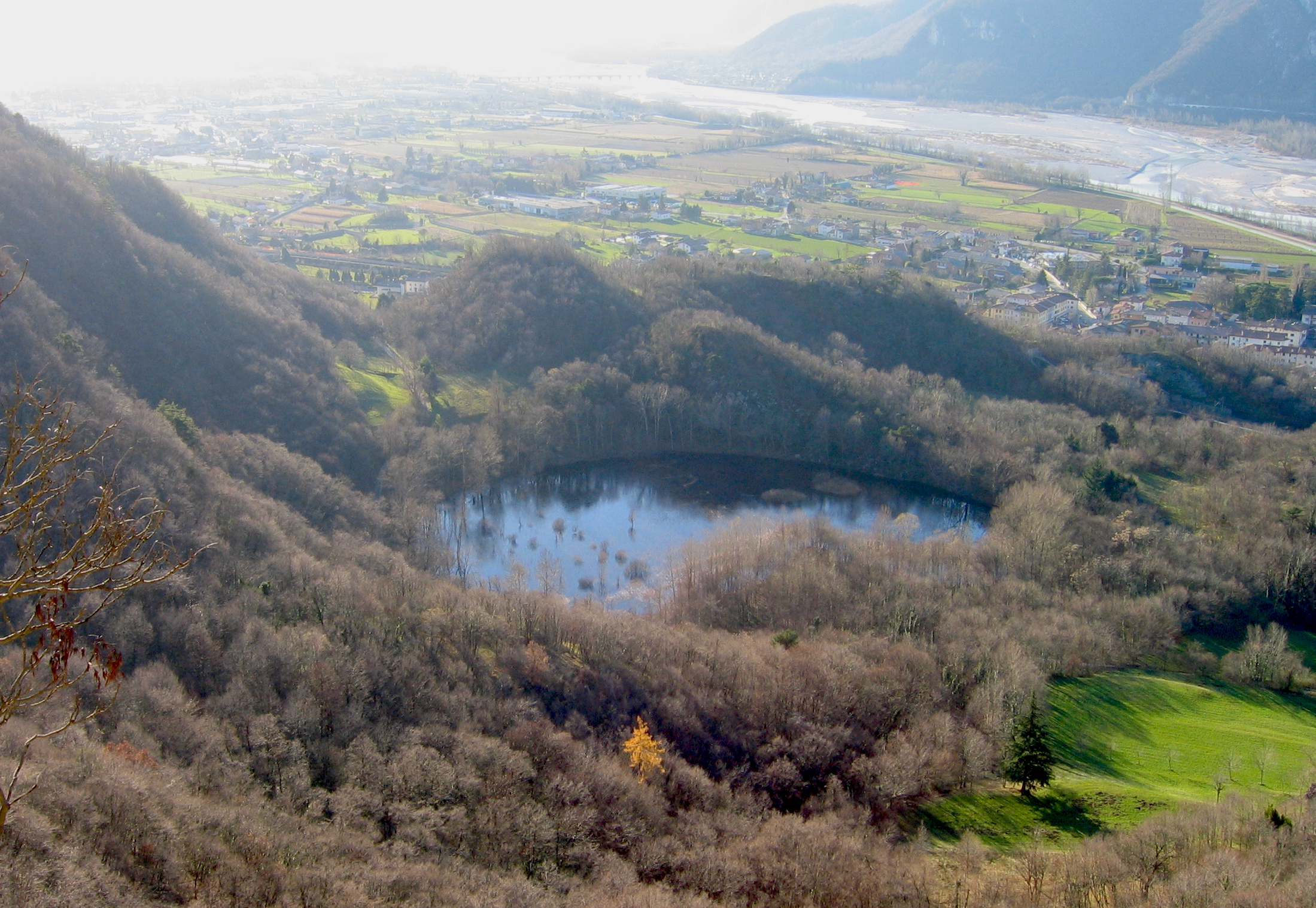 Ospedaletto di Gemona del Friuli con il suo lago, veduta dalla strada militare di Monte Ercole